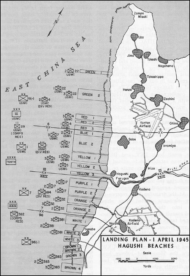 Mappa operativa di sbarco delle truppe statunitensi ad Hagushi, Okinawa